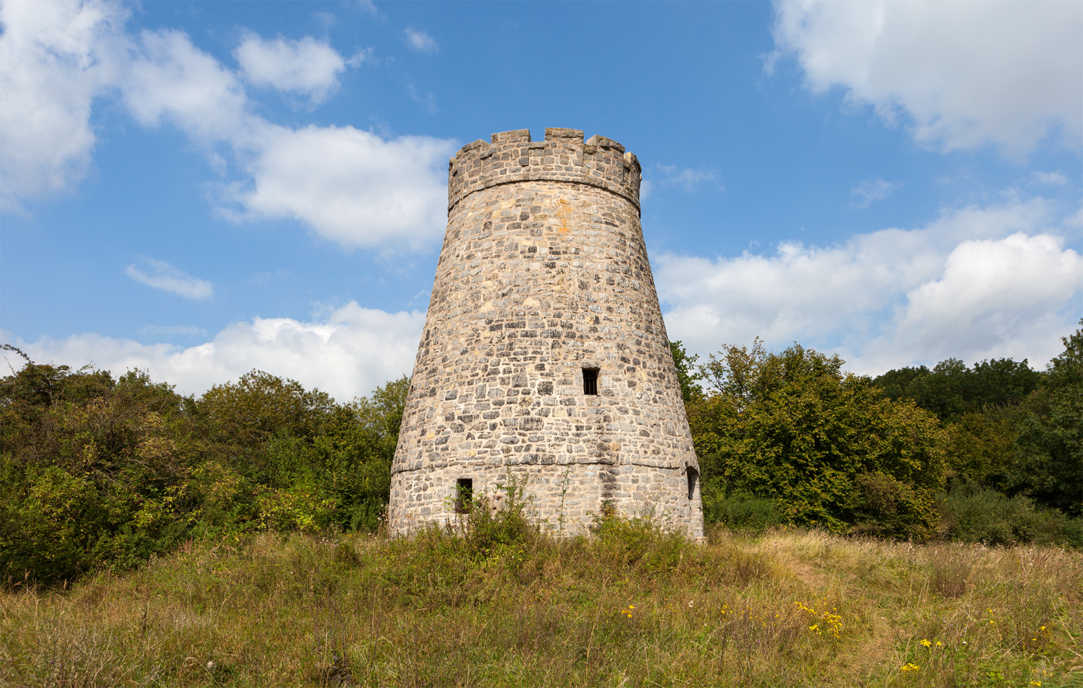 Windmühlenstumpf bei Barntrup (NSG Biotopkomplex am Mühlenturm)